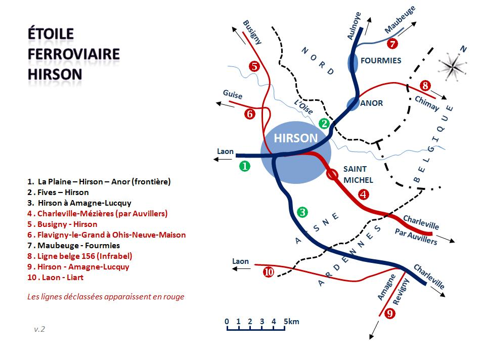 Etoile Ferroviaire d'Hirson